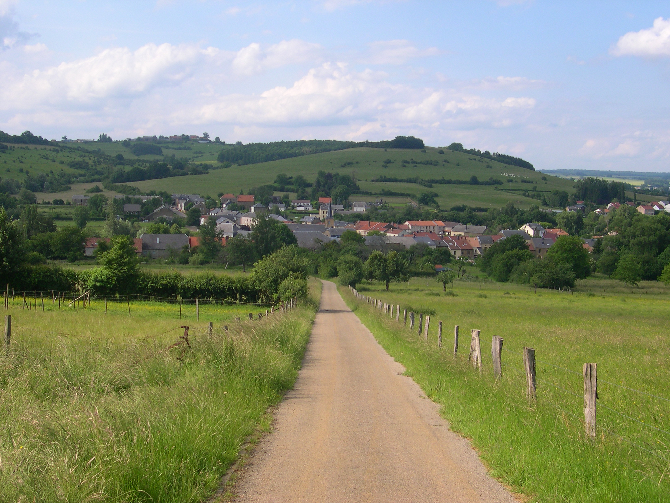 Vue générale de Lamorteau